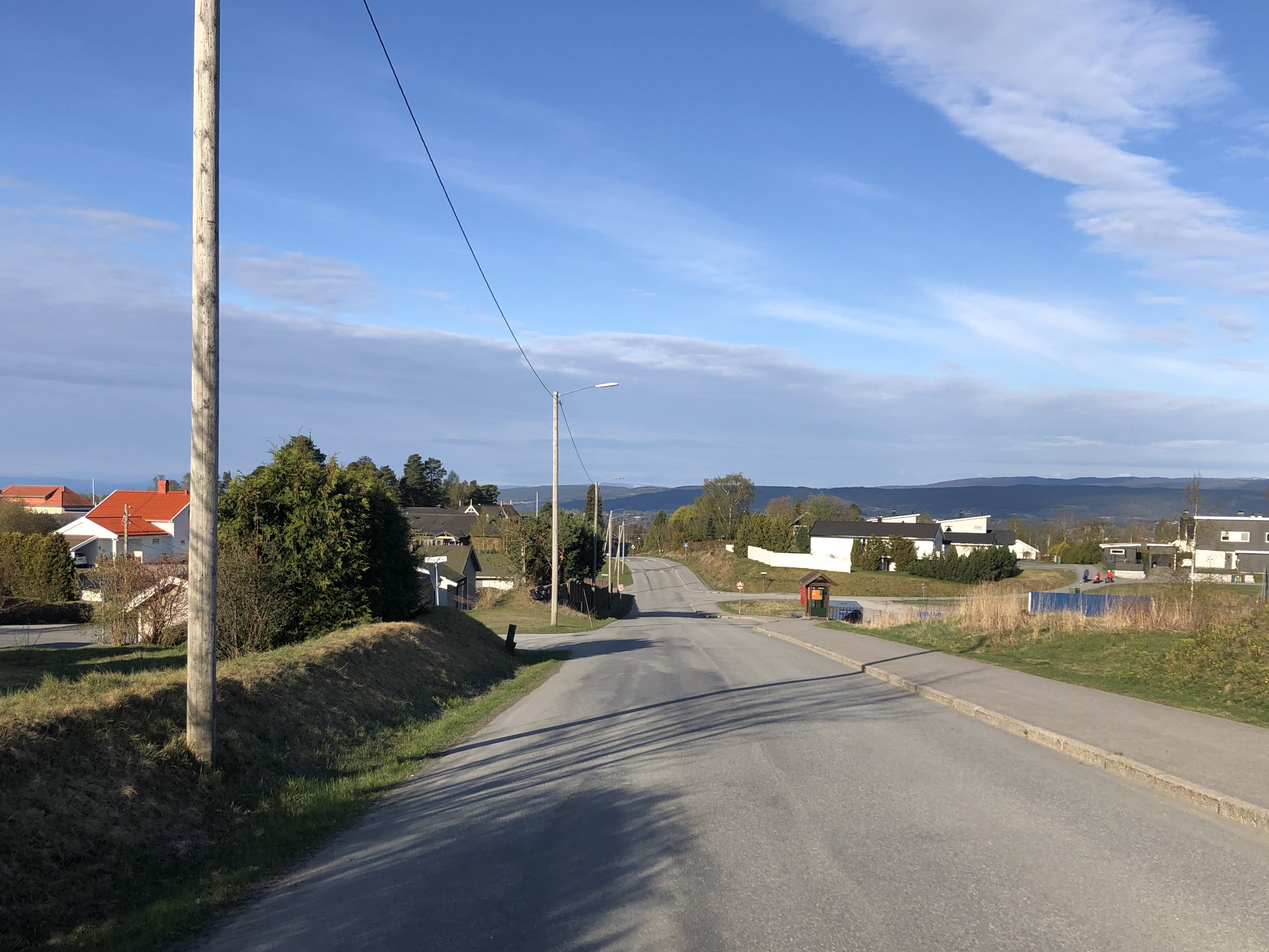 Harehaugveien, Ringerike